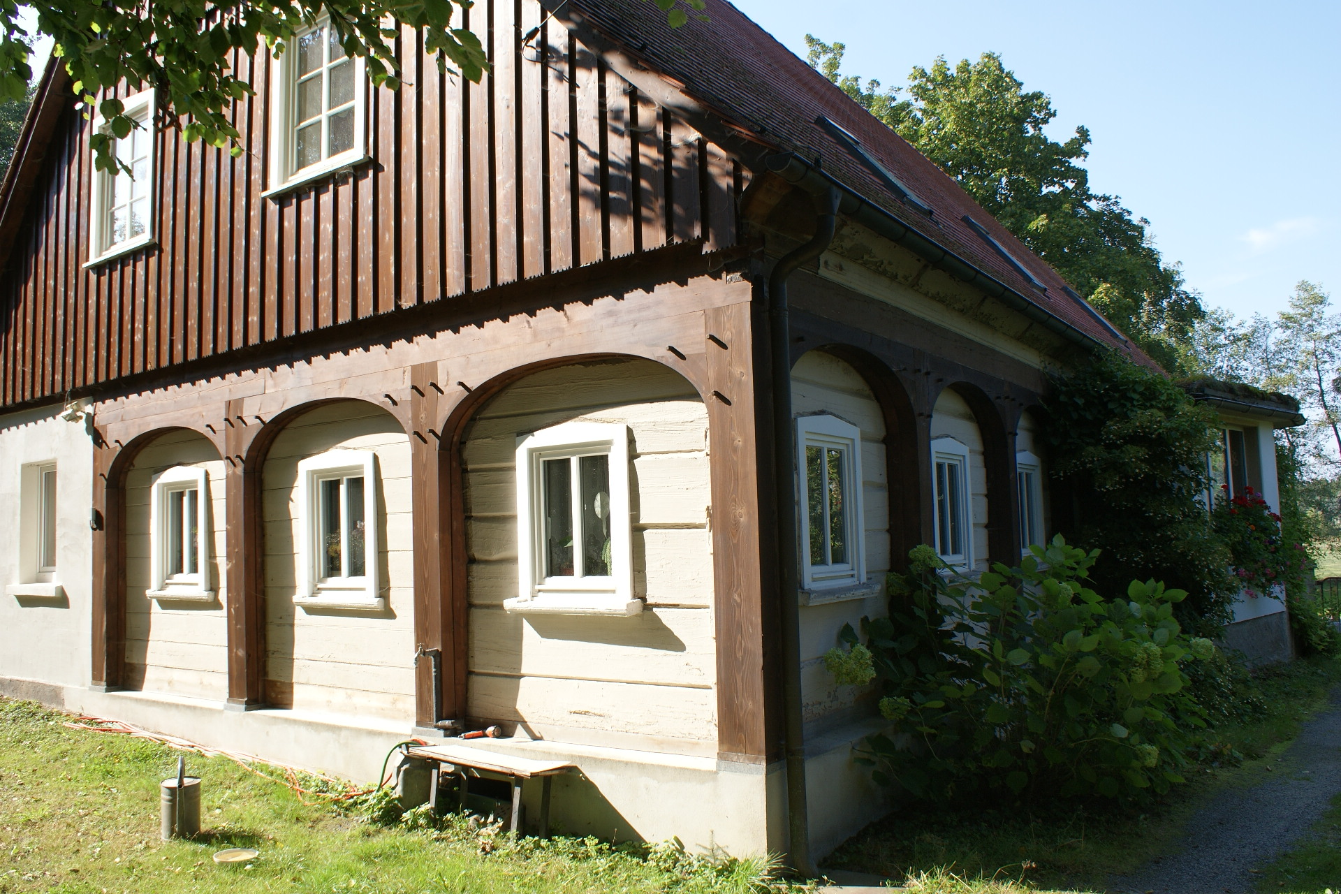 Alte Brennerei (mit Ausschank), ehemaliges Ferienheim Keulahütte, Friedensstraße 55 in Oberleutersdorf